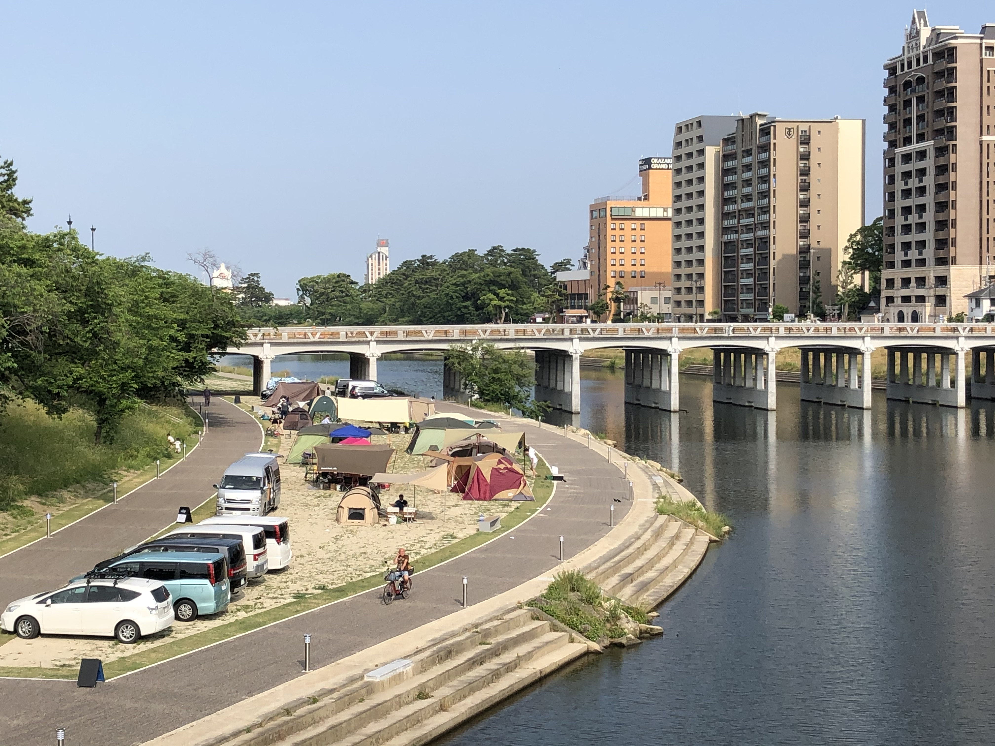 殿橋（愛知県岡崎市）